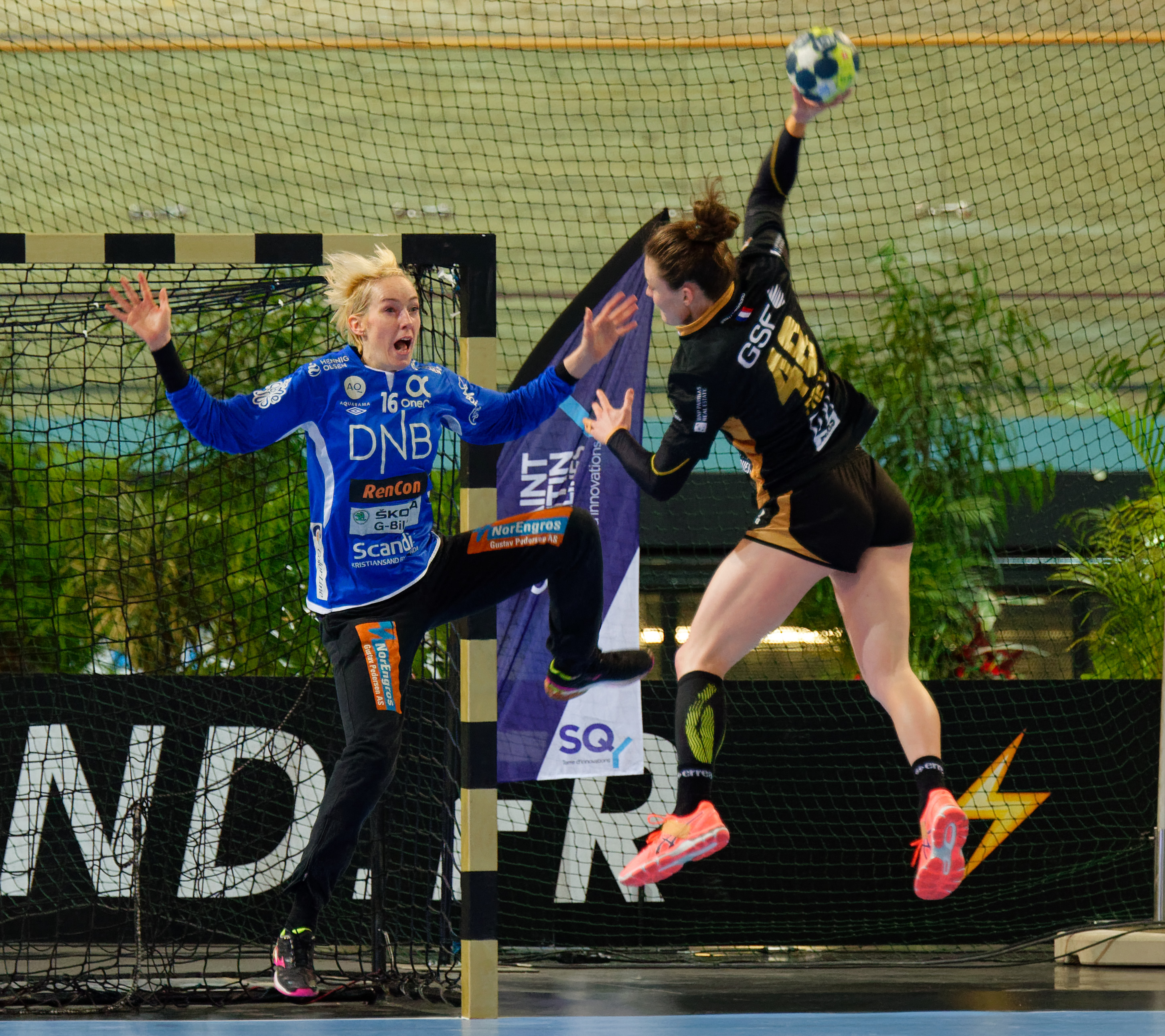 Rencontre du tour principal de coupe EHF entre Issy Paris Hand et les norvégiennes de Vipers Kristiansand au vélodrome de Saint-Quentin en Yvelines, le 03 février 2018.